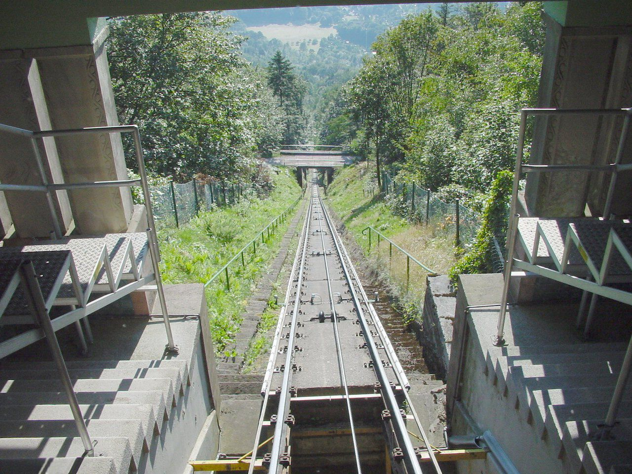 Merkurbahn von der Bergstation aus gesehen